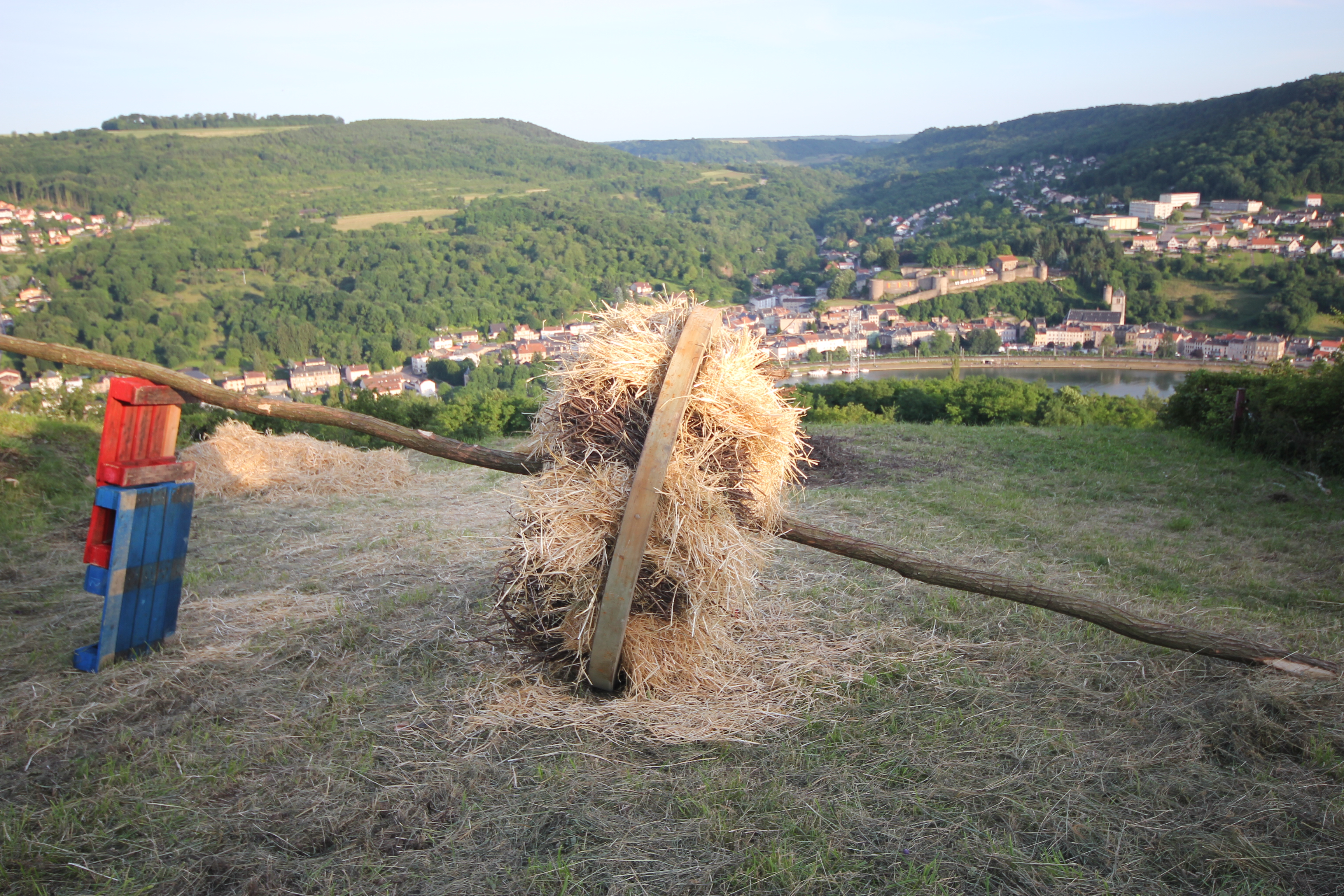 Contz-les-Bains - La roue bourrée avec les sarments de vignes et la paille